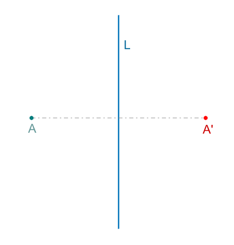 Simetría, Simetría axial, transformaciones isométricas, Geometry